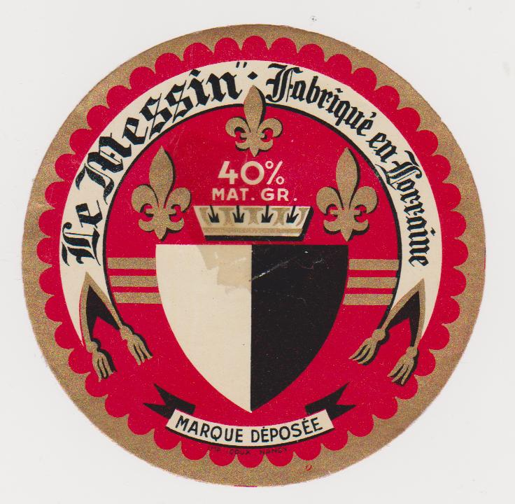 Fromage : Le Messin. Fabriqué en Lorraine.